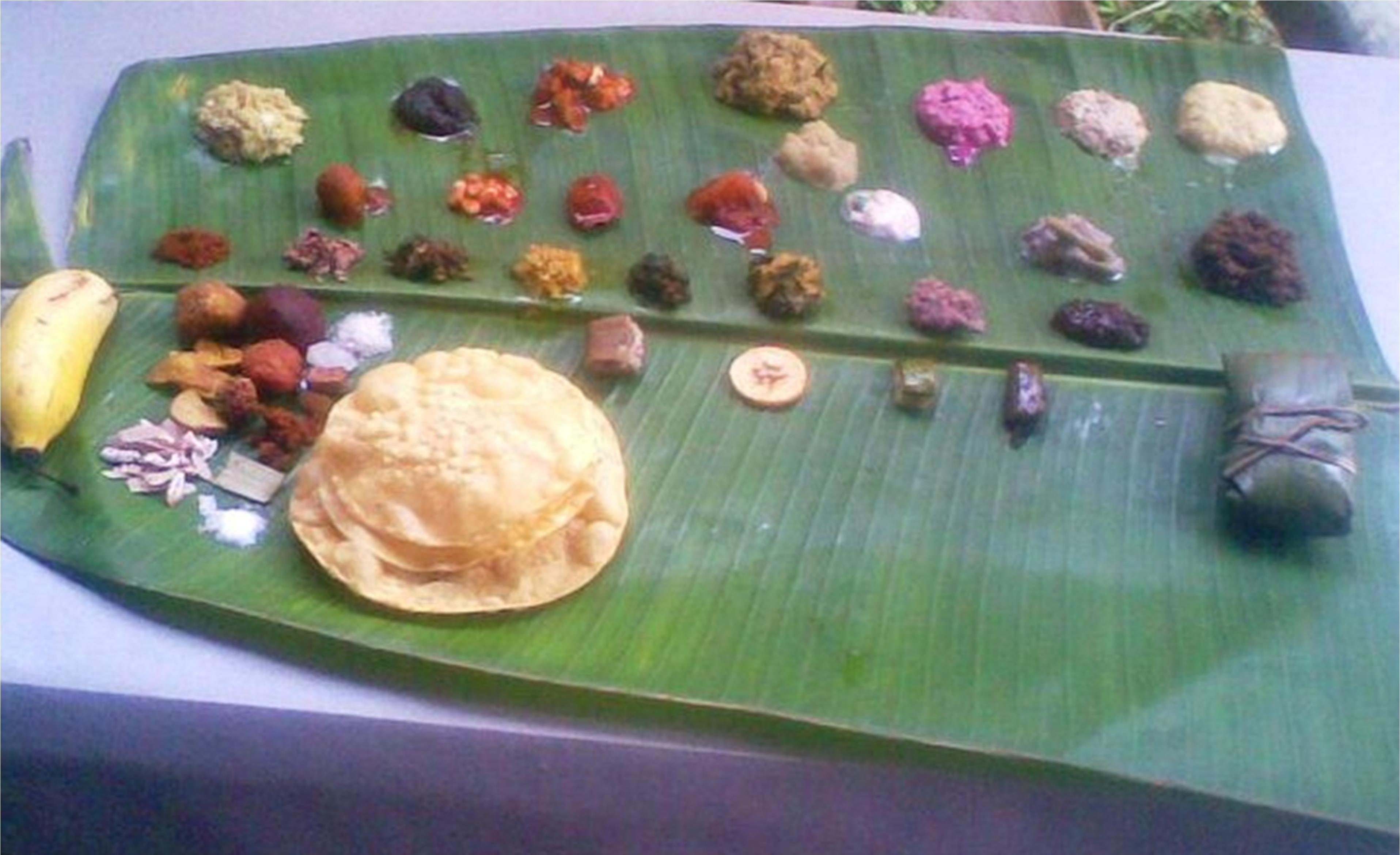 ആറന്മുള വള്ളസദ്യ